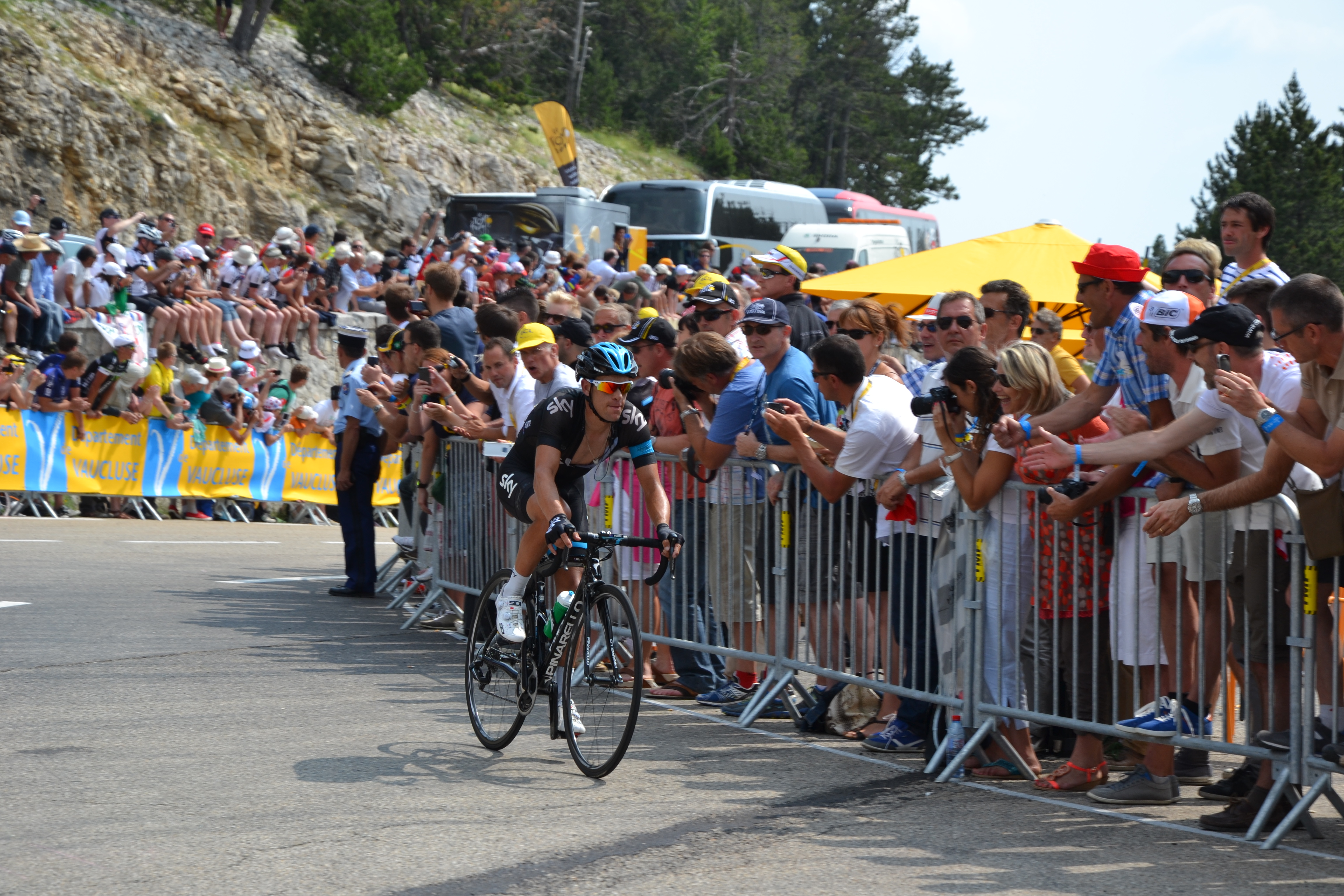 Richie Porte, au Chalet Reynard, Mont Ventoux, lors de la 15ème étape du Tour de France 2013